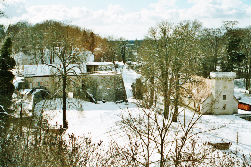 Blick auf den Museumspark Rüdersdorf